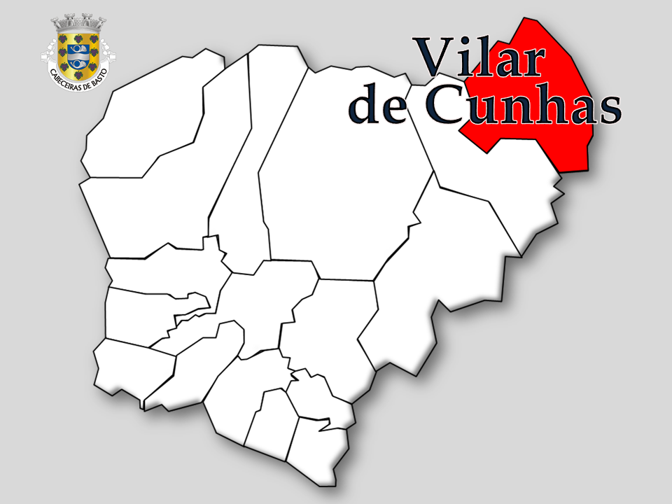 Censos 1864/2011